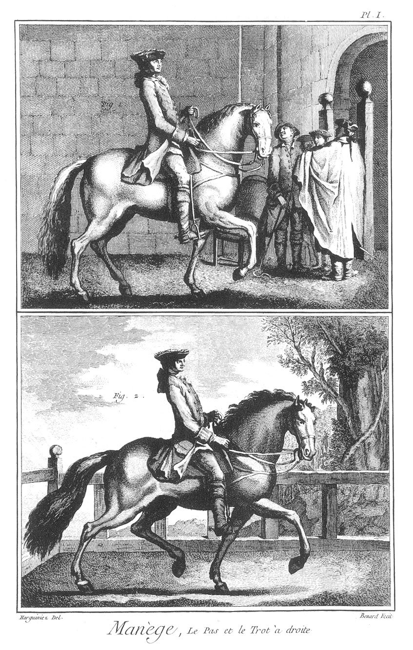 Tafel Manège, Le Pas et le Trot à droite, aus: Encyclopédie, ou Dictionnaire raisonné des sciences, des arts et des métiers, sechster Tafelband (siebter Band): 1769